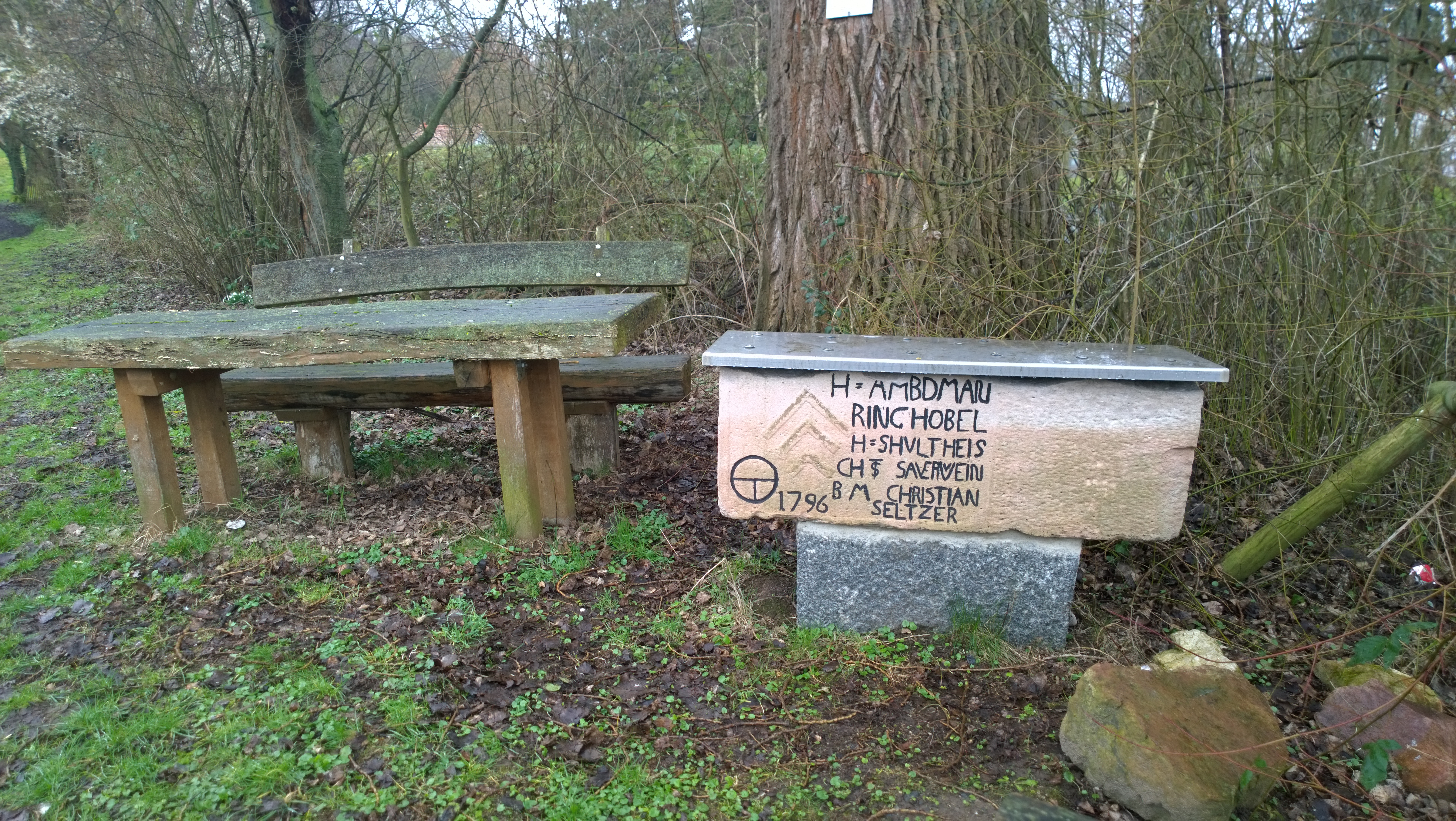 Restaurierter Brückenstein zur Reparatur einer Kleestädter Brücke 1796